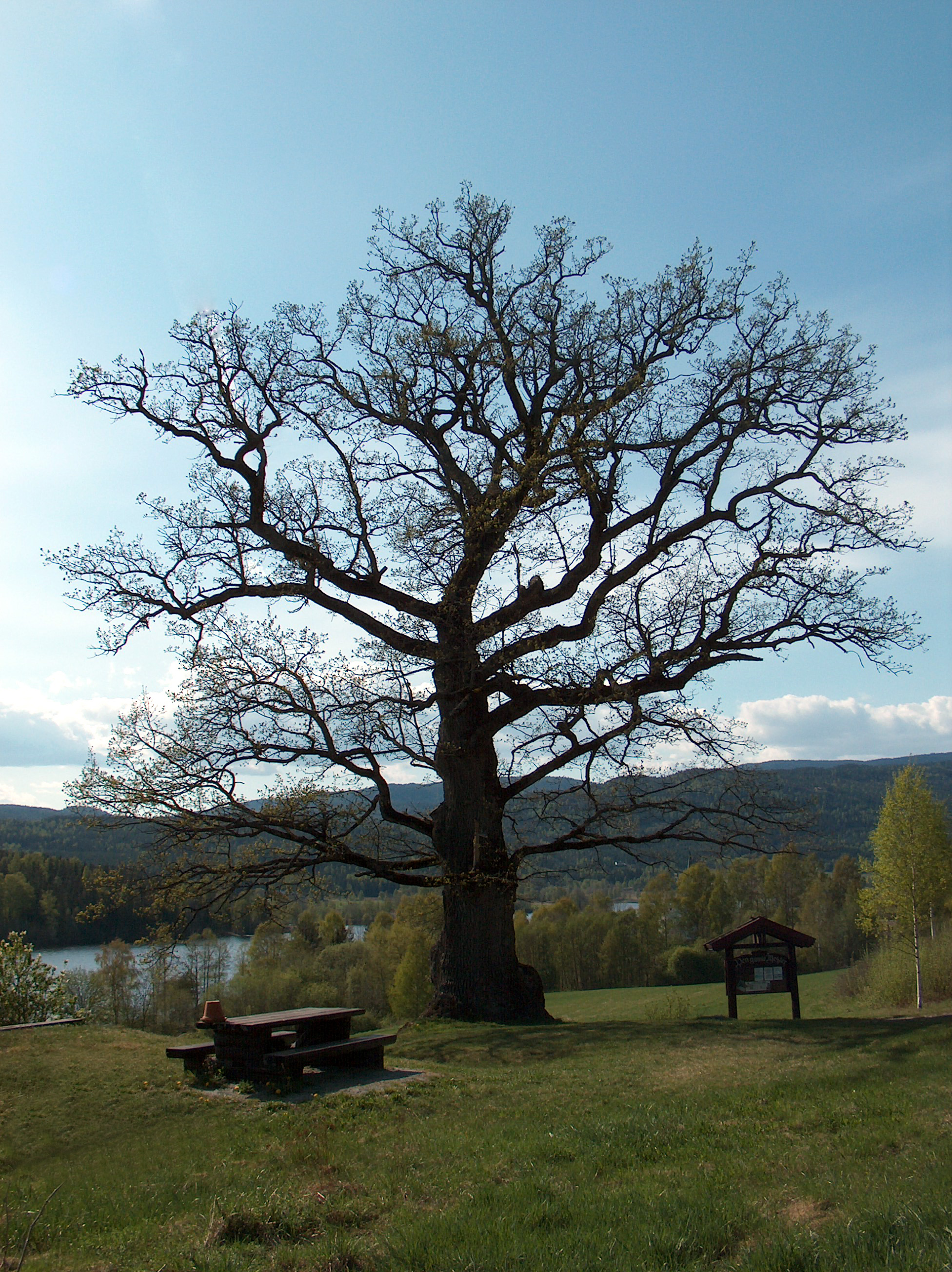 Den gamle mester